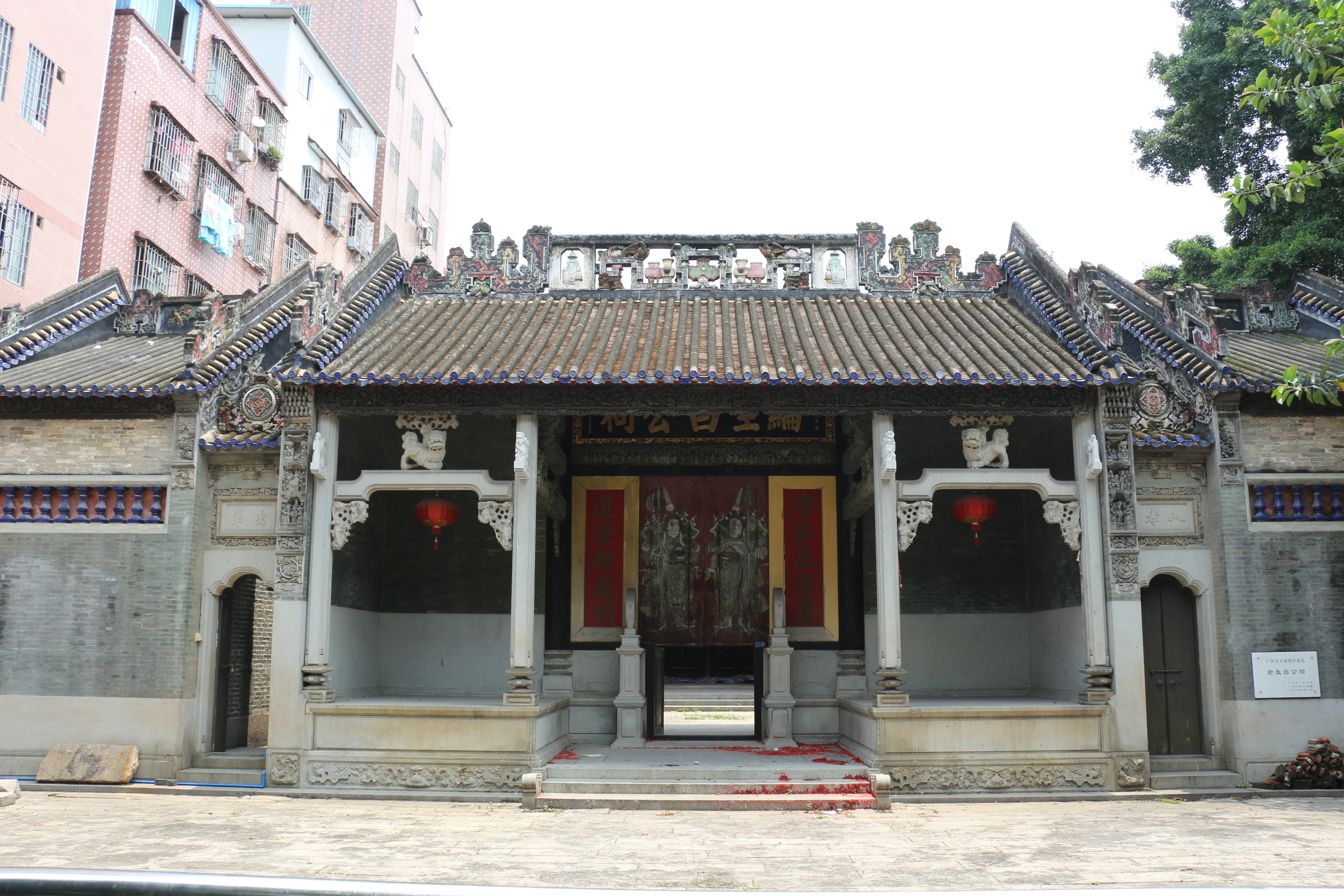 位于龙潭村西约大街22号龙潭小学内。2002年7月17日纶生白公祠含“乐善好施”牌坊晋升为第四批广东省文物保护单位。